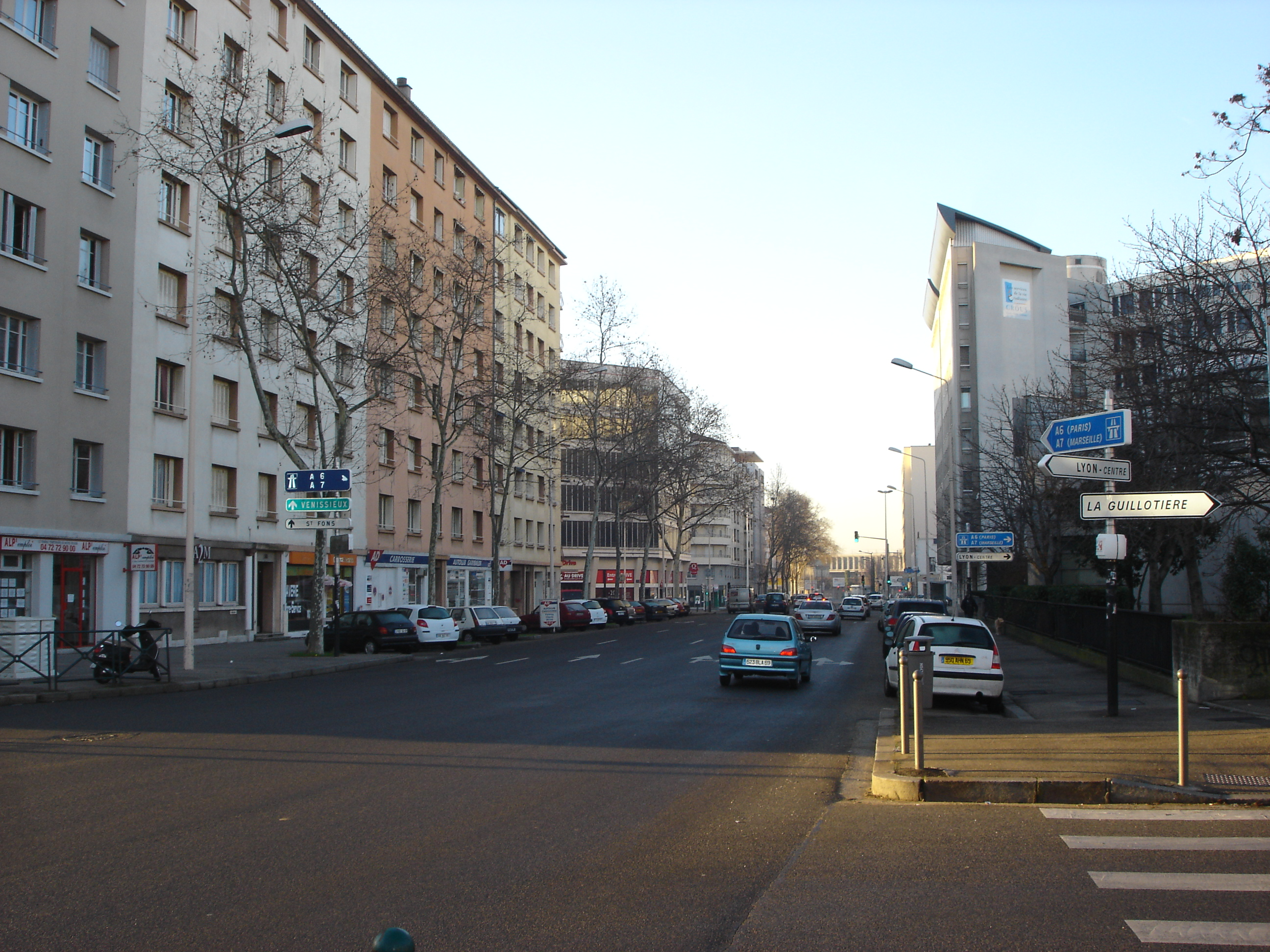 La rue Garibaldi dans le 7e arrondissement au niveau de l'ancienne caserne sergent Blandan.